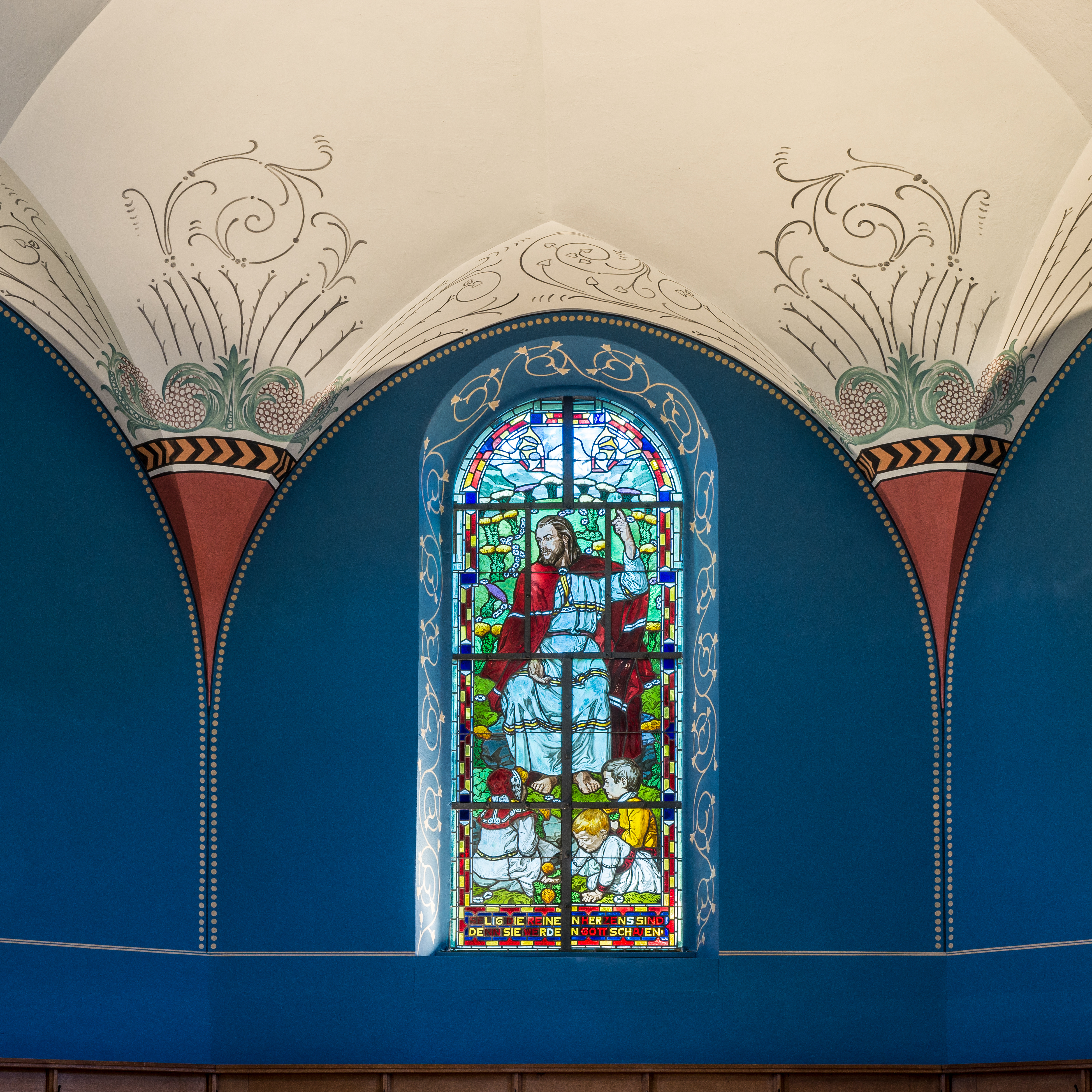 Restauration Chorbemalung 2015; Chorfenster von 1920 von Aloys Balmer